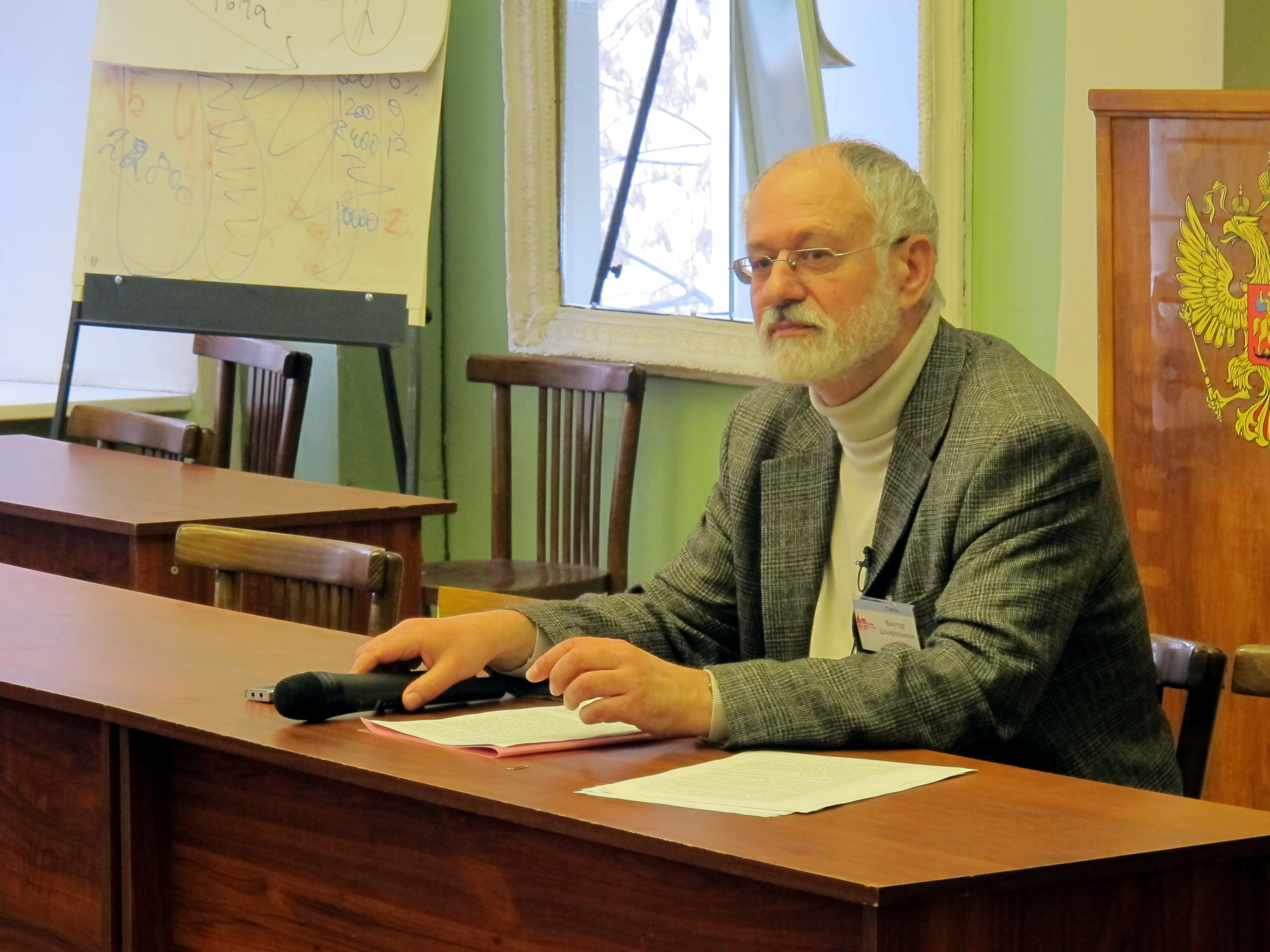 Виктор Шнирельман на Викиконференции 2012